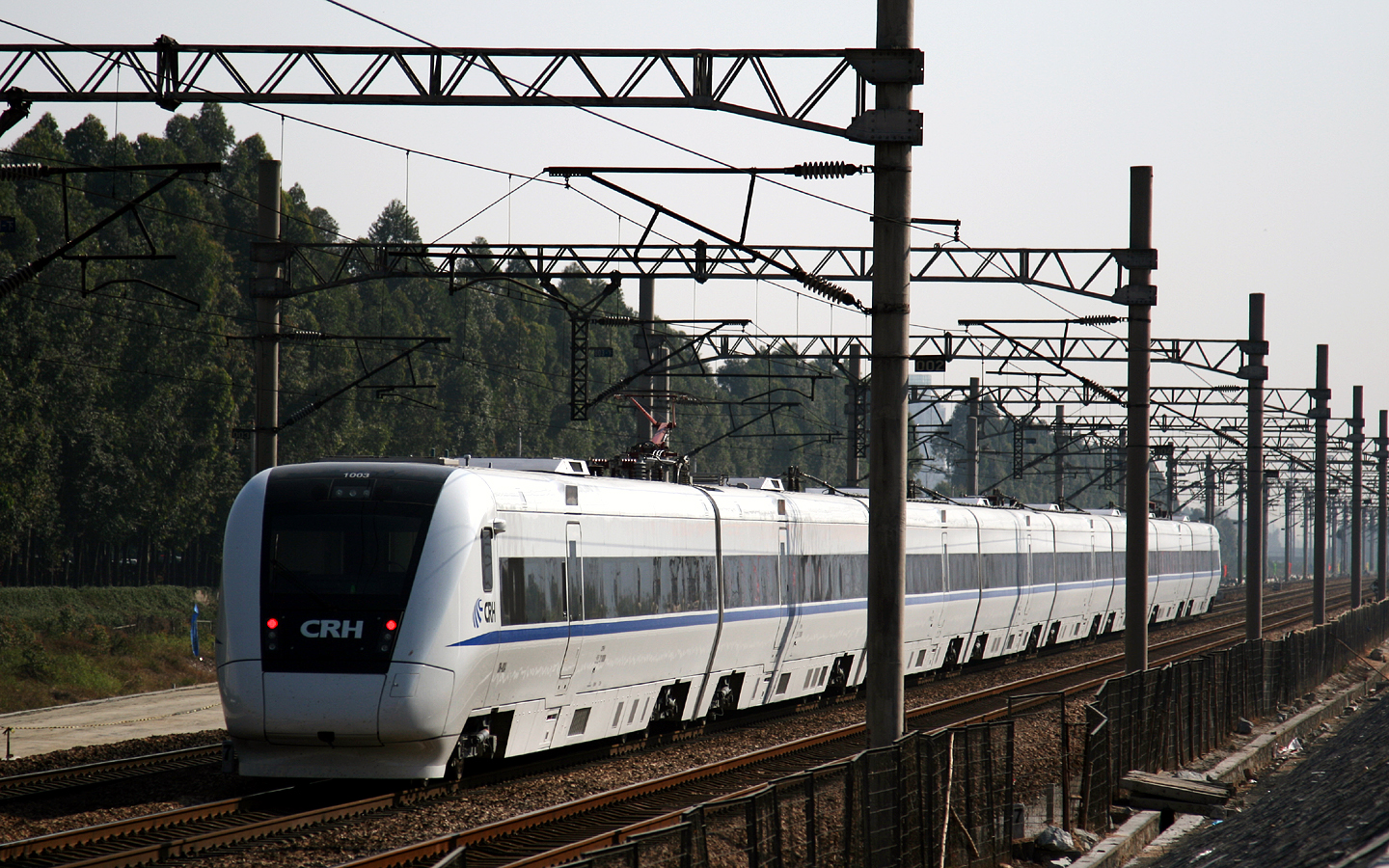 CHR1行驶于广深铁路